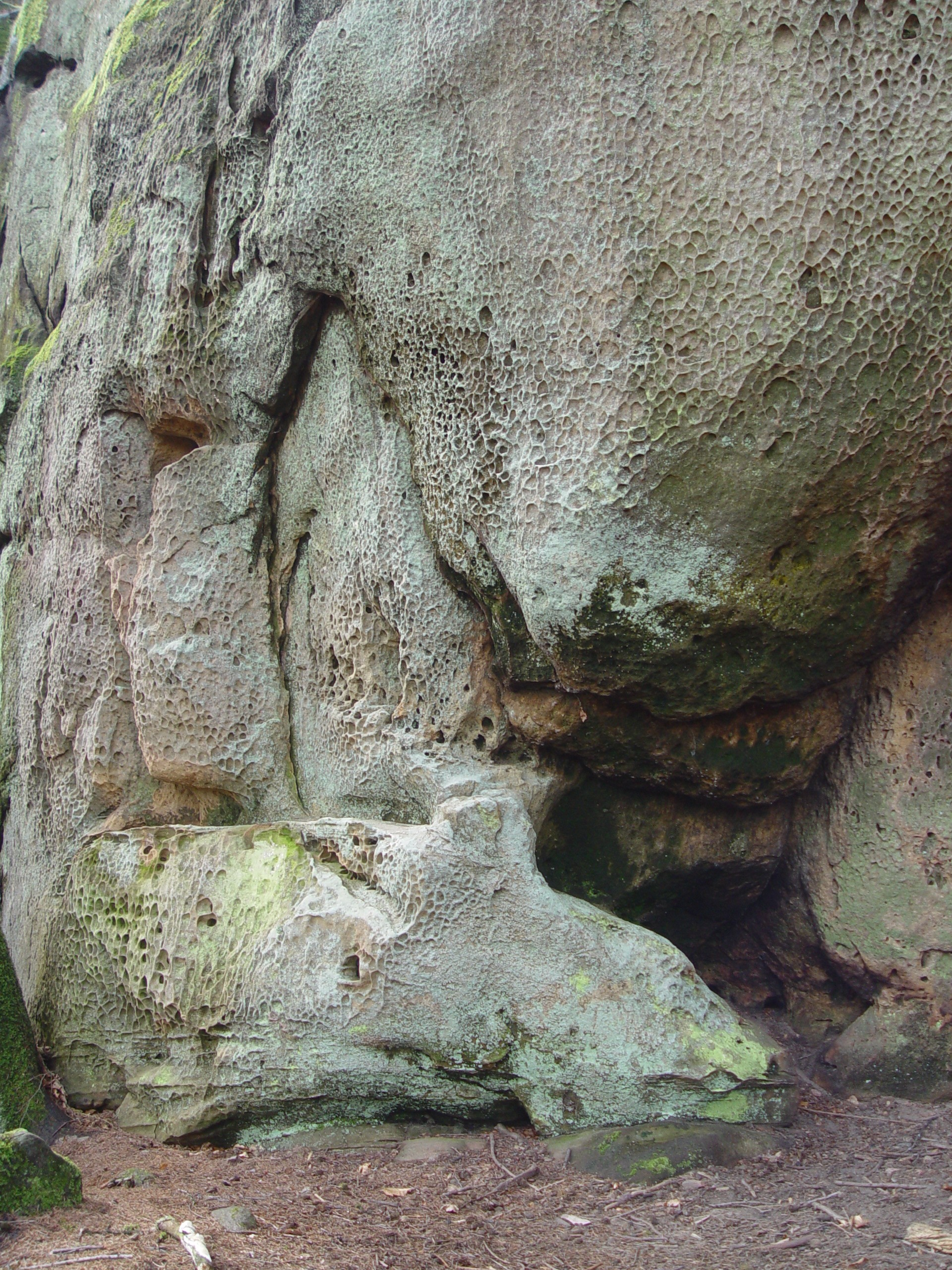 Aufnahme einer Wabenverwitterung in der Teufelsschlucht in der Eifel